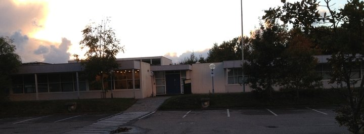 Sløjdhøjskolen, Stengårdsvej 144, Esbjerg Øst.